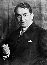 JUDr. Josef Polák, muzejník